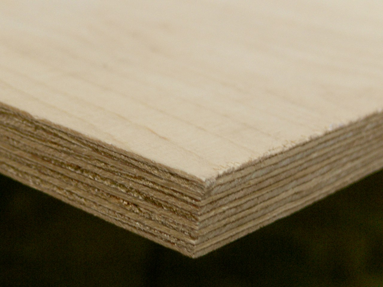 Kuva 15 mm paksuisesta koivuvanerista. Alkuperäisen kuvan on ottanut Marko Palojärvi.